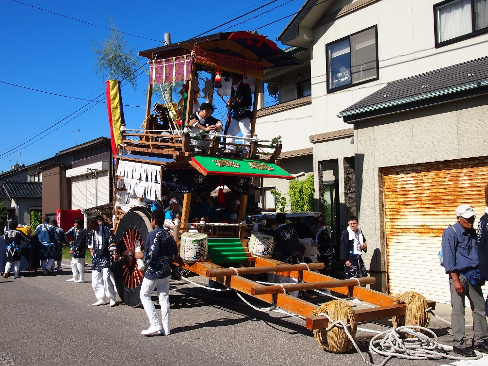 瀬波大祭 新田町